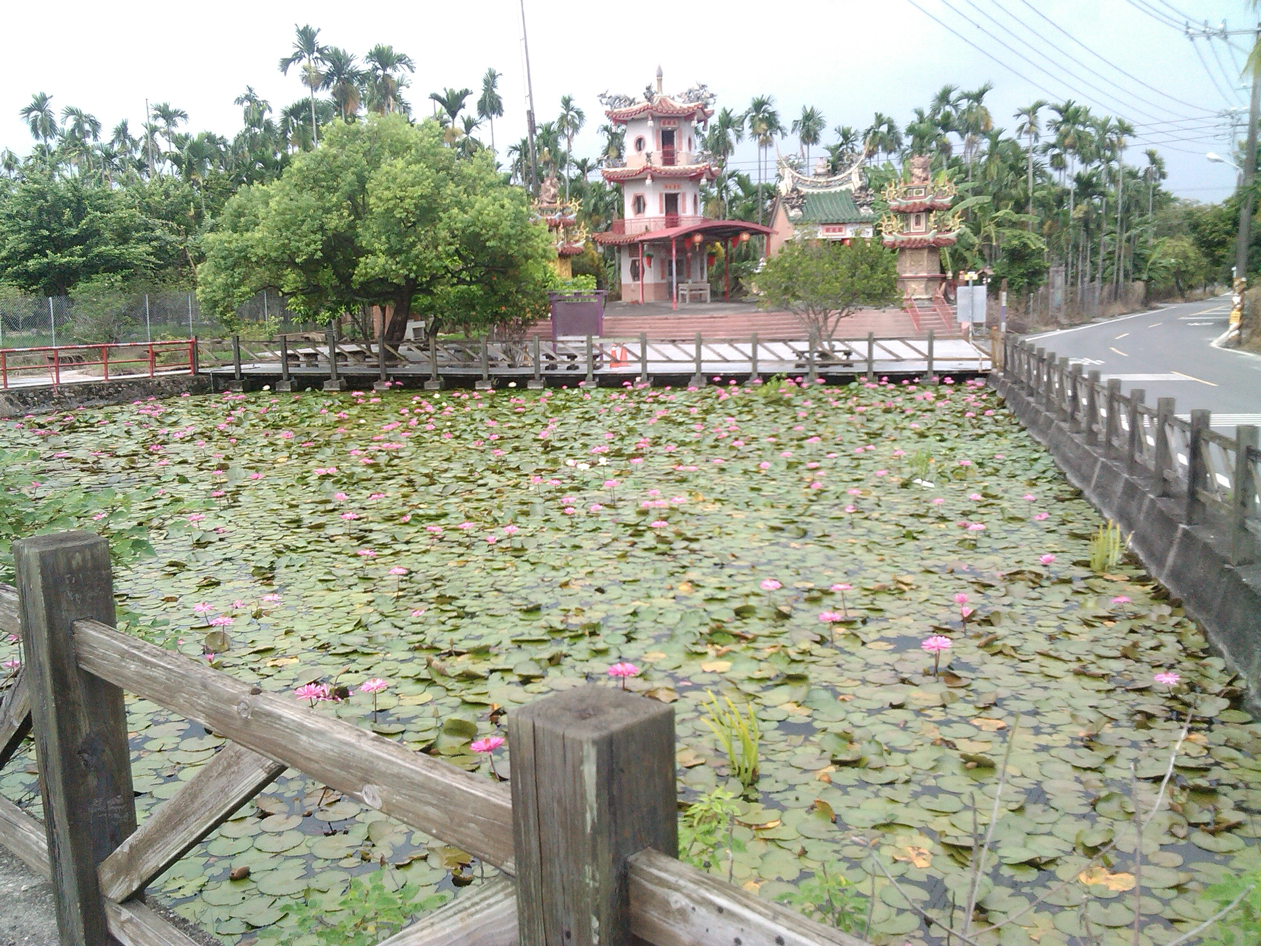 位於六巷村往西勢村的太平路上